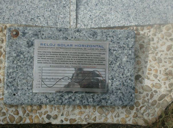 Reloj Solar en las instalaciones del Observatorio Astronómico Nacional de Llano del Hato, estado Mérida - Venezuela